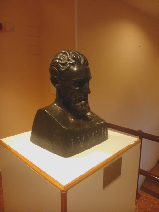 Escultura situada en el segundo piso de la Casa Municipal de Cultura de Avilés. Representa al poeta Luis Menéndez Alonso, conocido como Lumen.